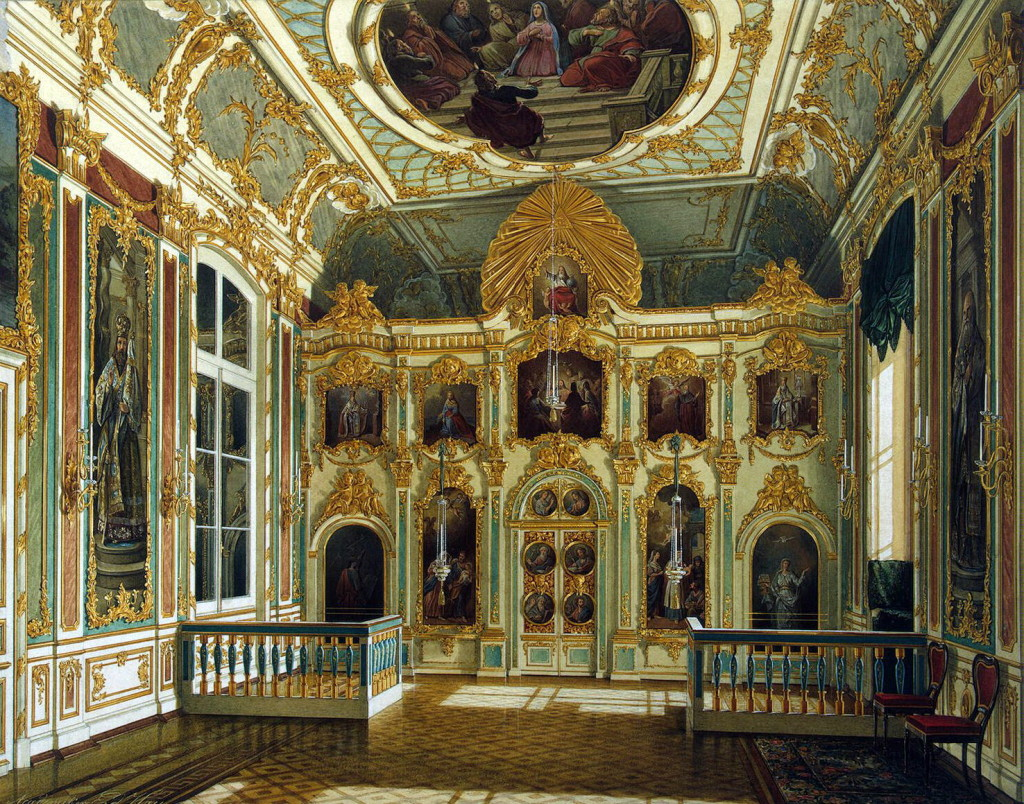 Э.П. Гау. Вид Малой церкви в Зимнем дворце